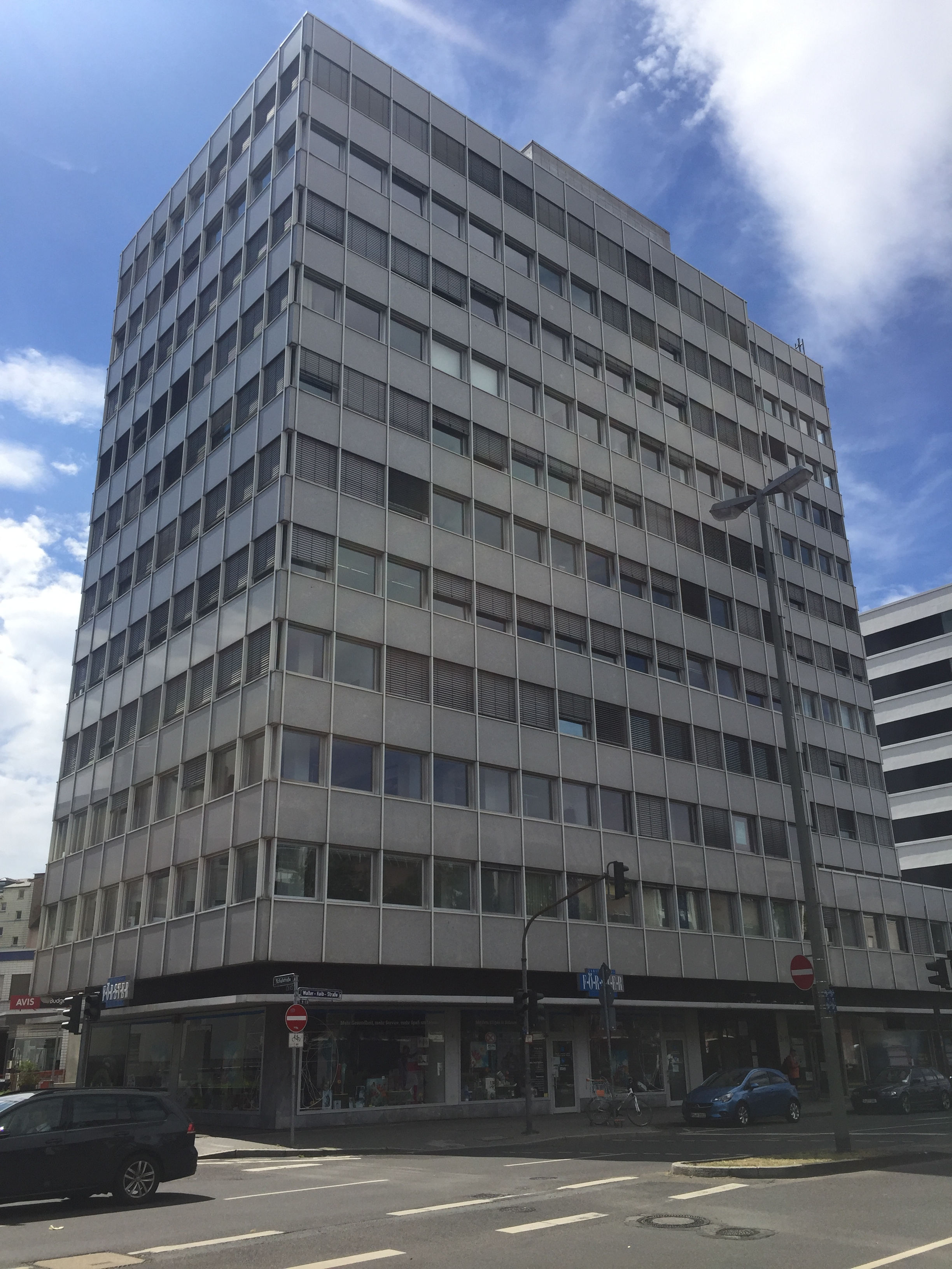 Walter-Kolb-Strasse 9-11 in Frankfurt am Main. Erstes Büro des Frauenreferats.